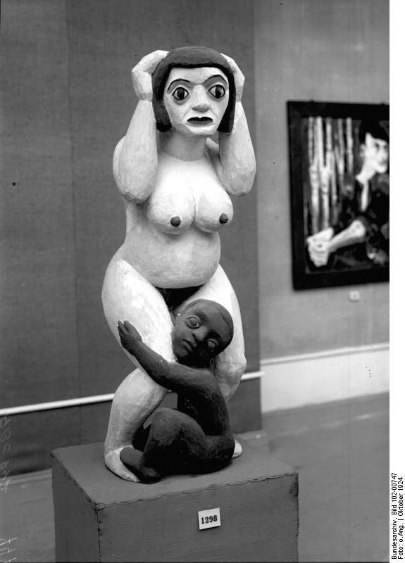 Juryfreie Kunstausstellung ! Die Kustausstellung der juryfreien Kunstaschau im Landesausstellungsgebäude in Berlin. Holzplastik "Mutter" von Hermann Scherer, Basel."